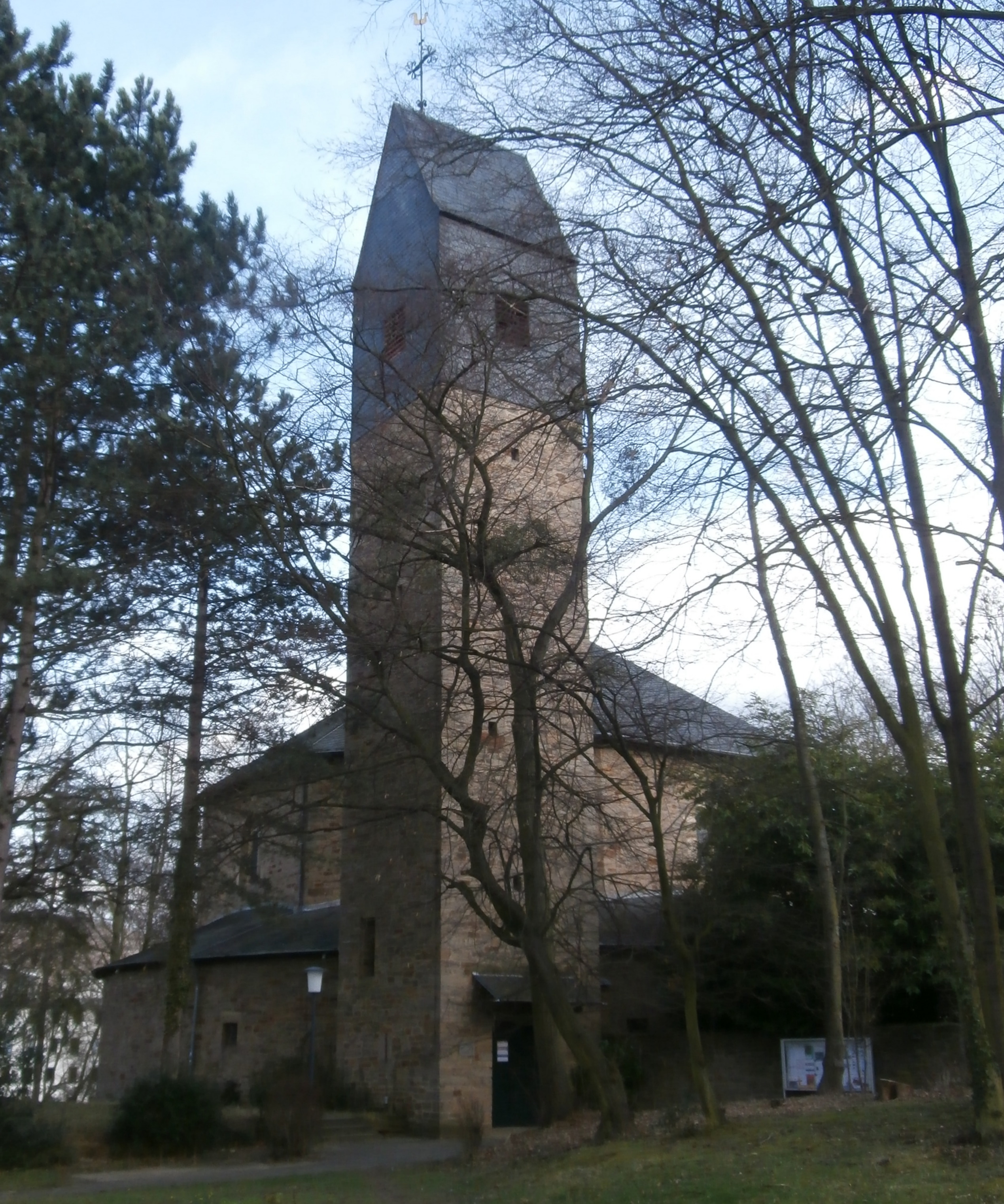 Katholische Pfarrkirche St. Hildegard, Deichmanns Aue, Rüngsdorf, Bad Godesberg